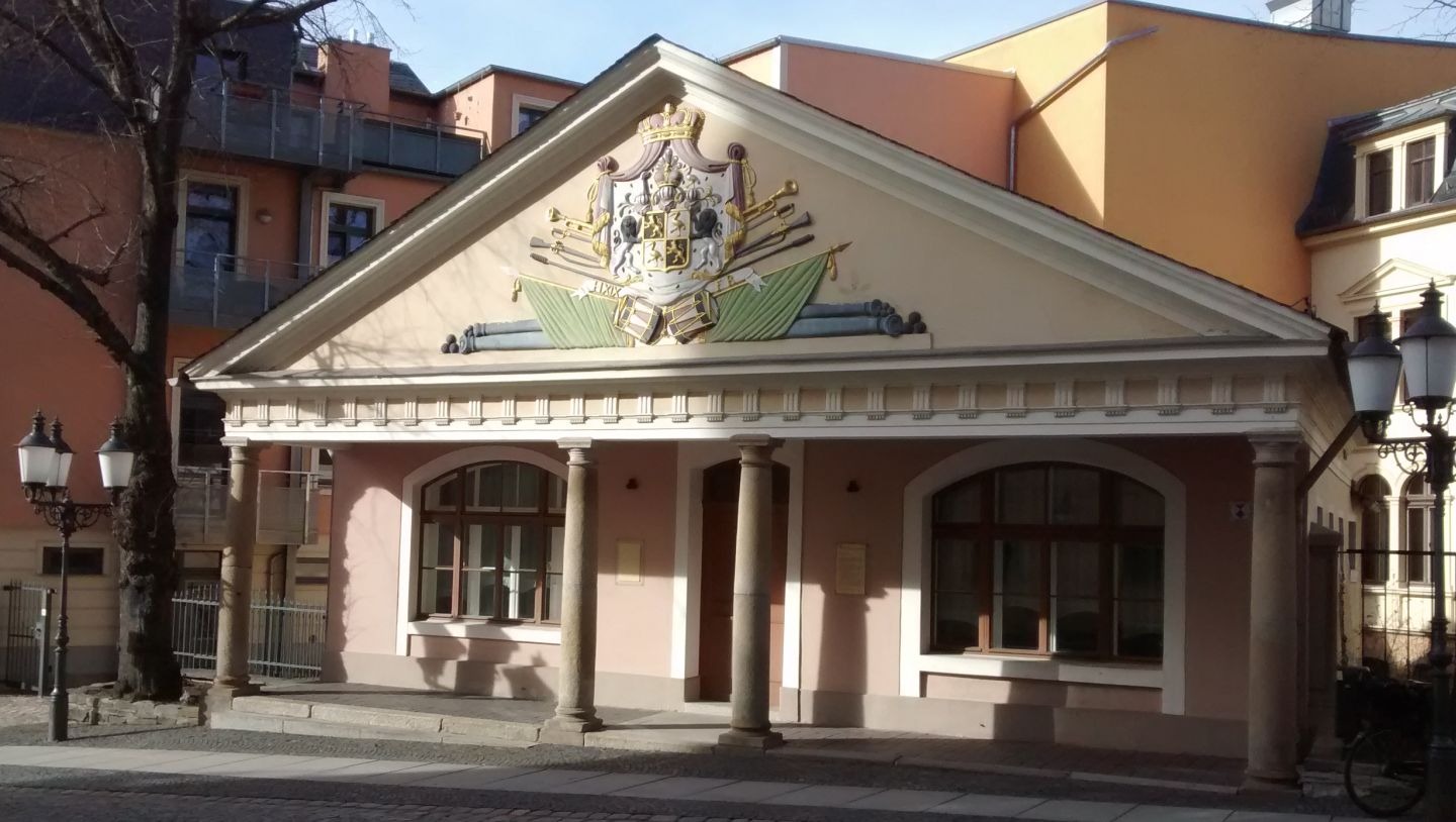 Hauptwache in Greiz